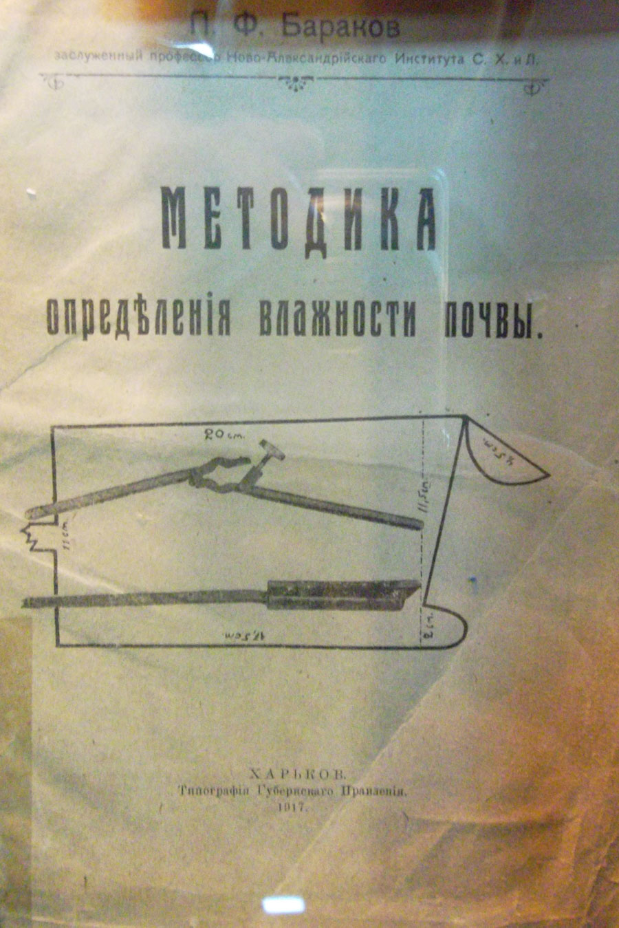 Книга П. Ф. Баракова (1858—1919) — русского ученого-агронома, профессора ХАрьковского с-х. инст.